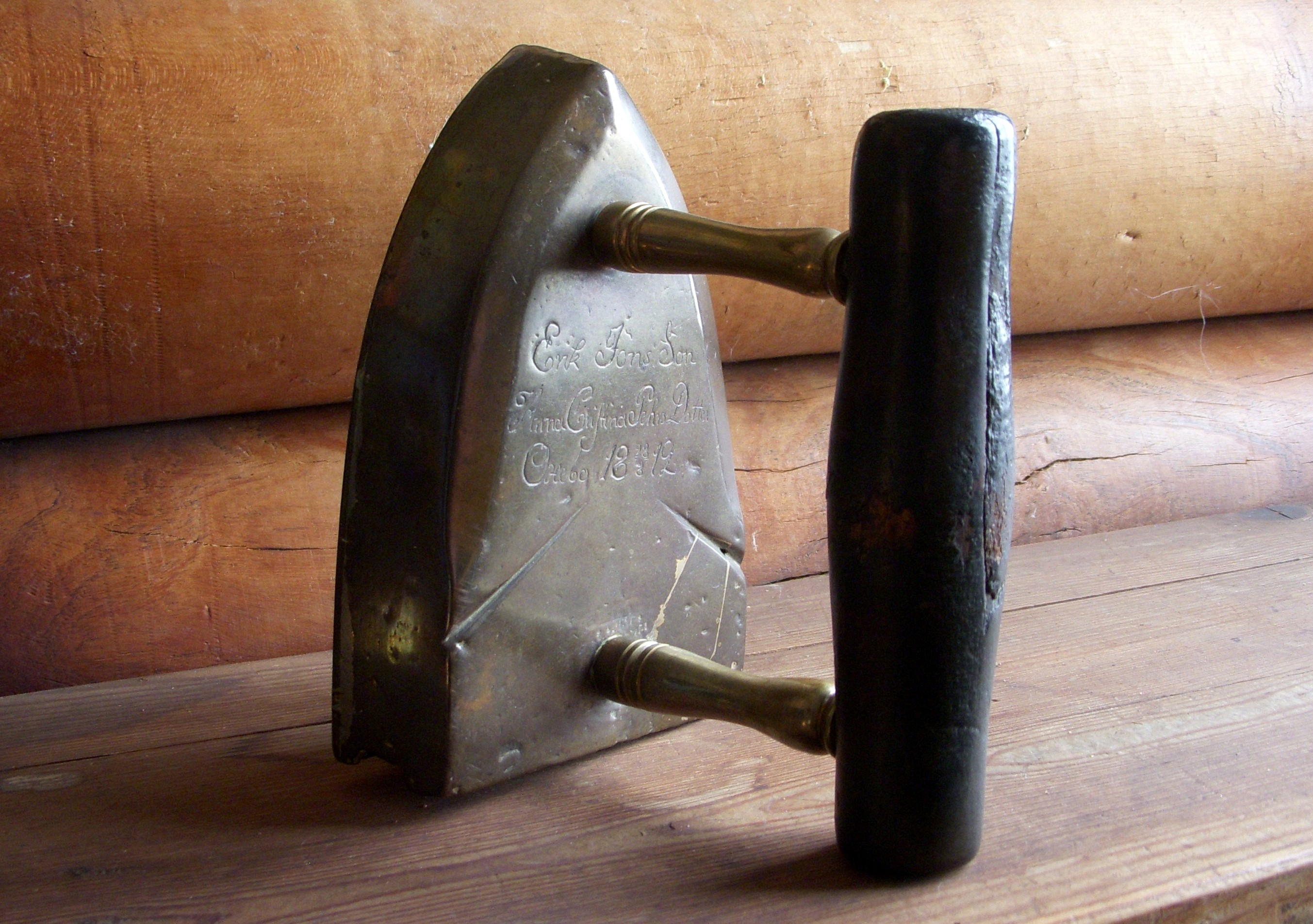 Hagalunds Tvätterimuseum i Huddinge